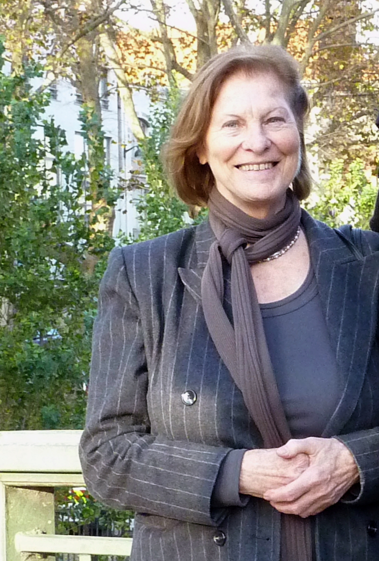 Rita Gombrowicz